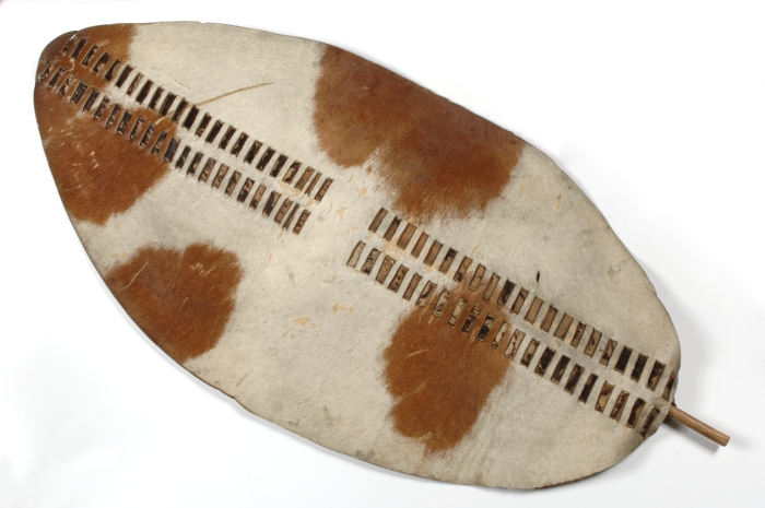 De stok aan de achterzijde dient als handvat en steun.